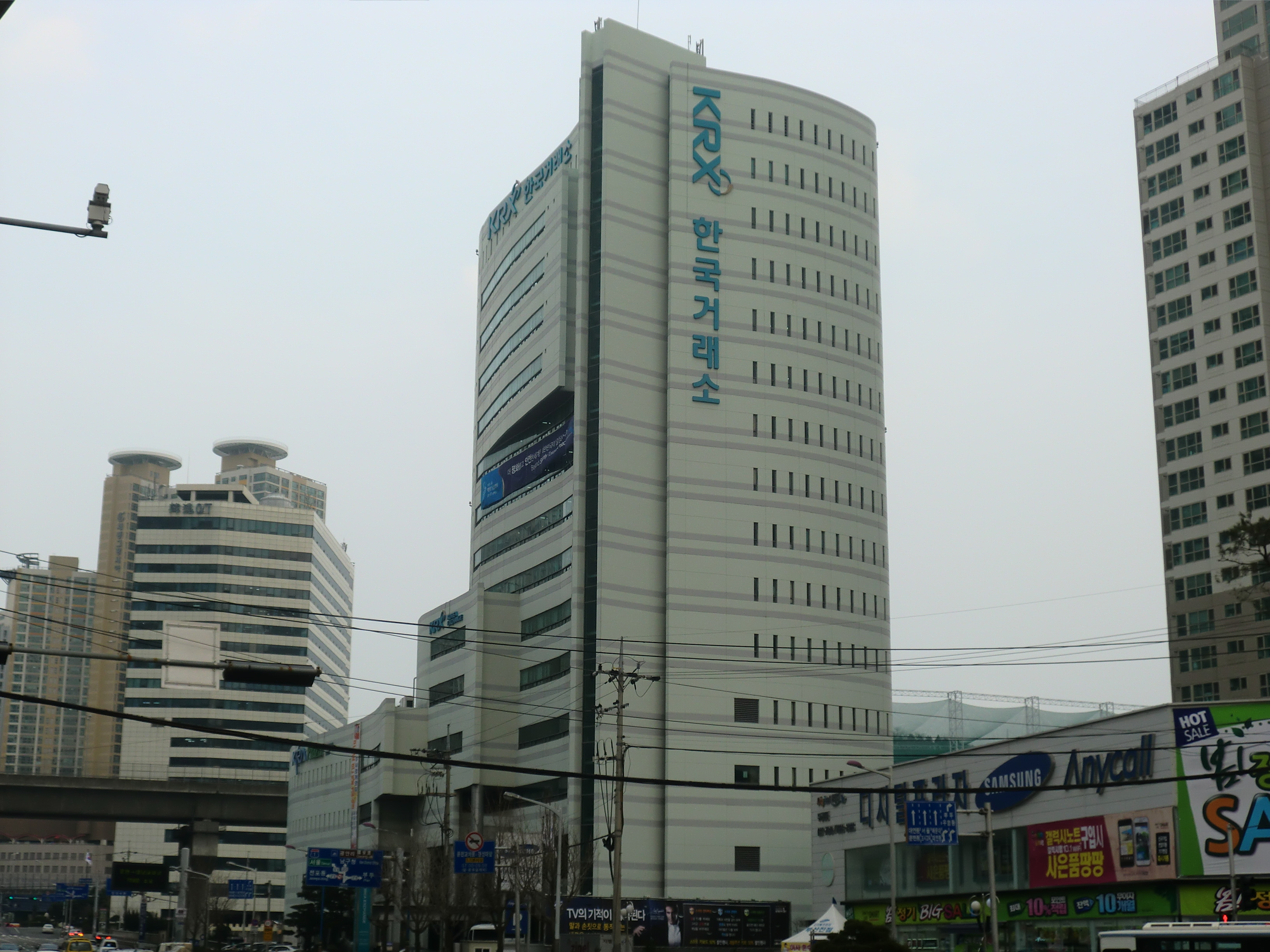 부산광역시 동구에 있는 한국거래소